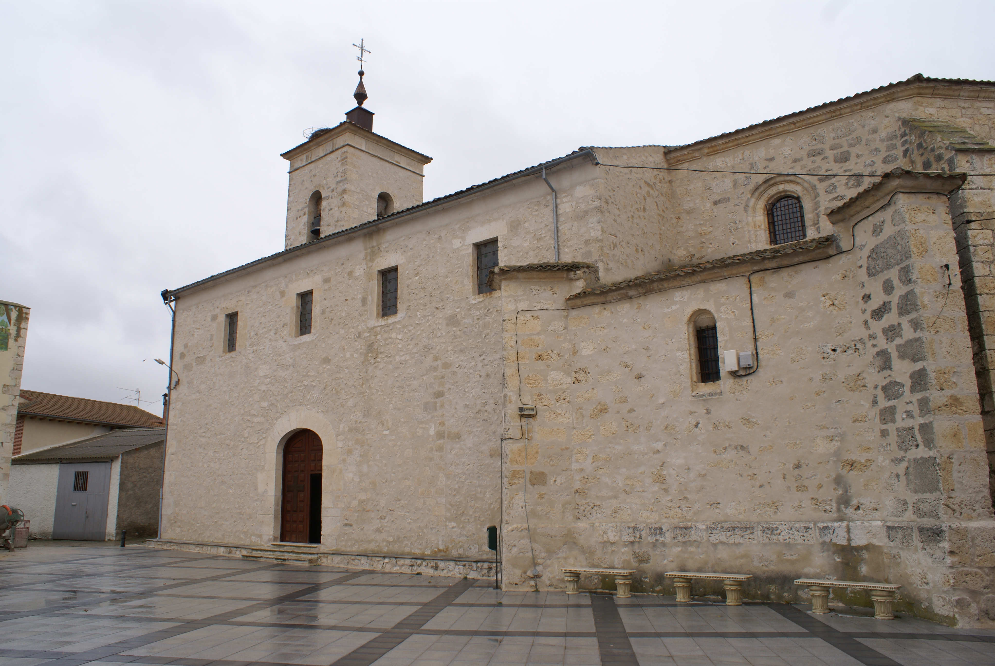 Iglesia de Santo Domingo de Silos de Fuentesaúco de Fuentidueña, Segovia.